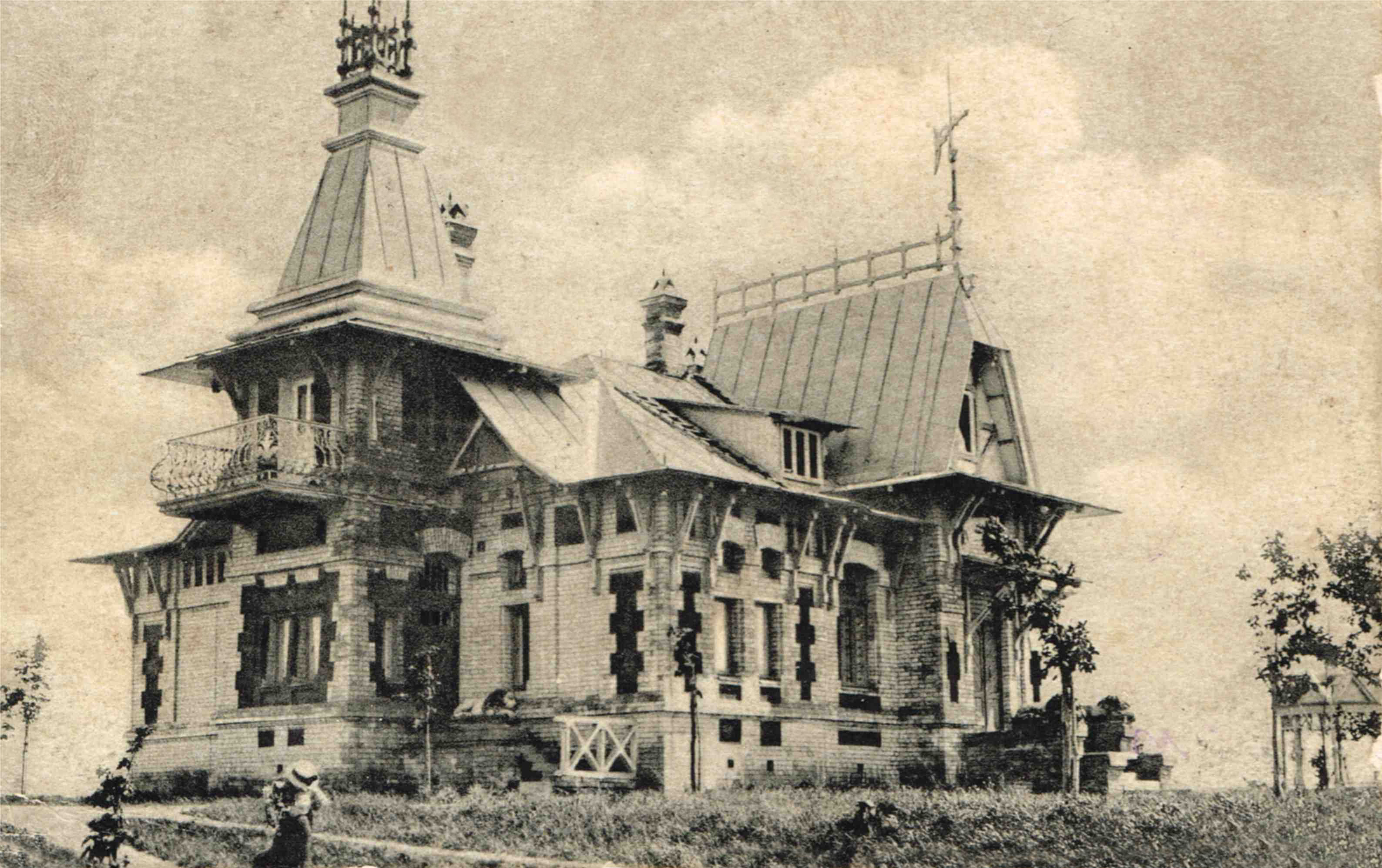 Дача київського фабриканта Миколи Чоколова. (Ірпінь)